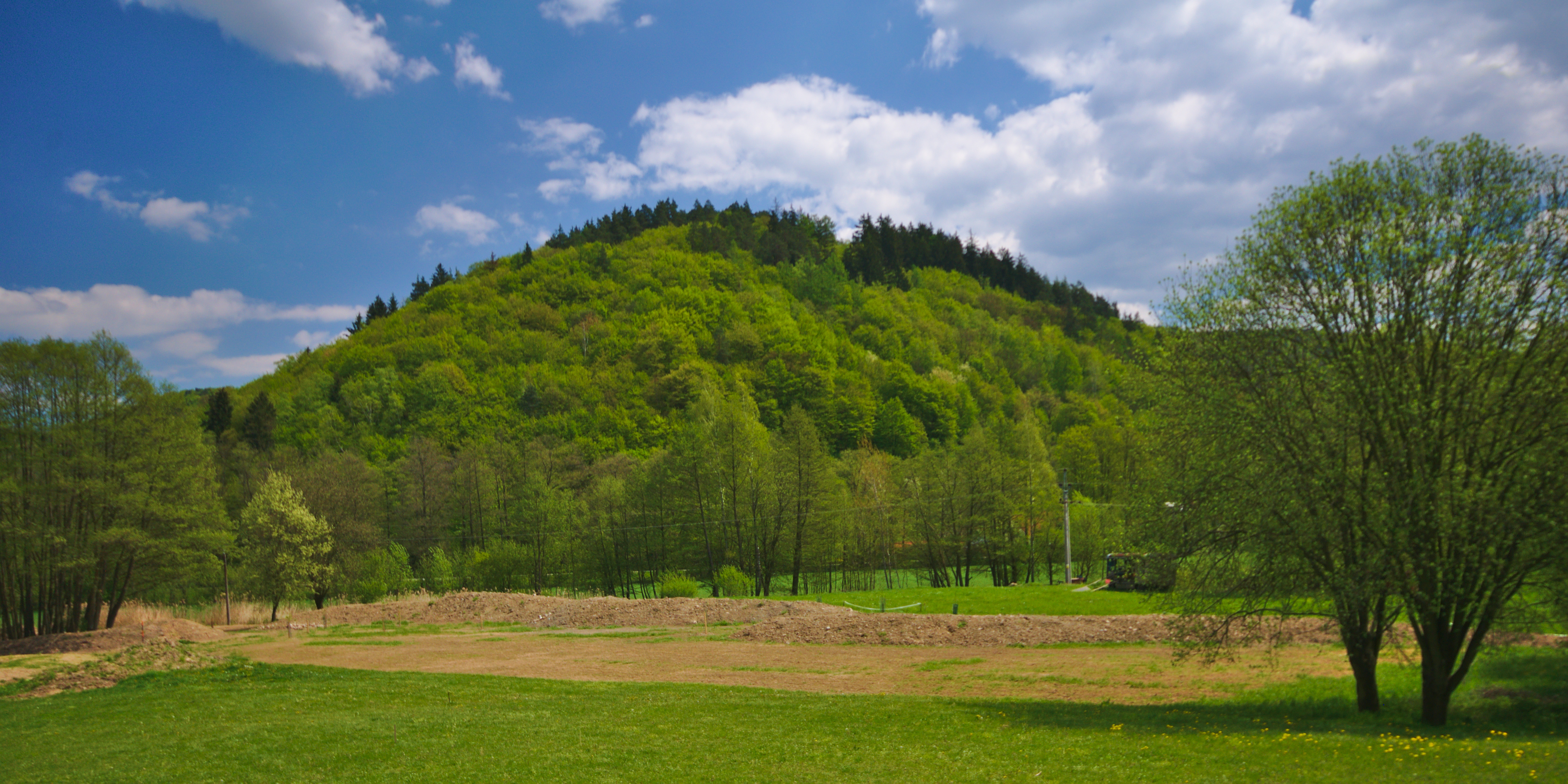 Pohled na přírodní rezervaci Nad horou od severozápadu, okres Brno-venkov